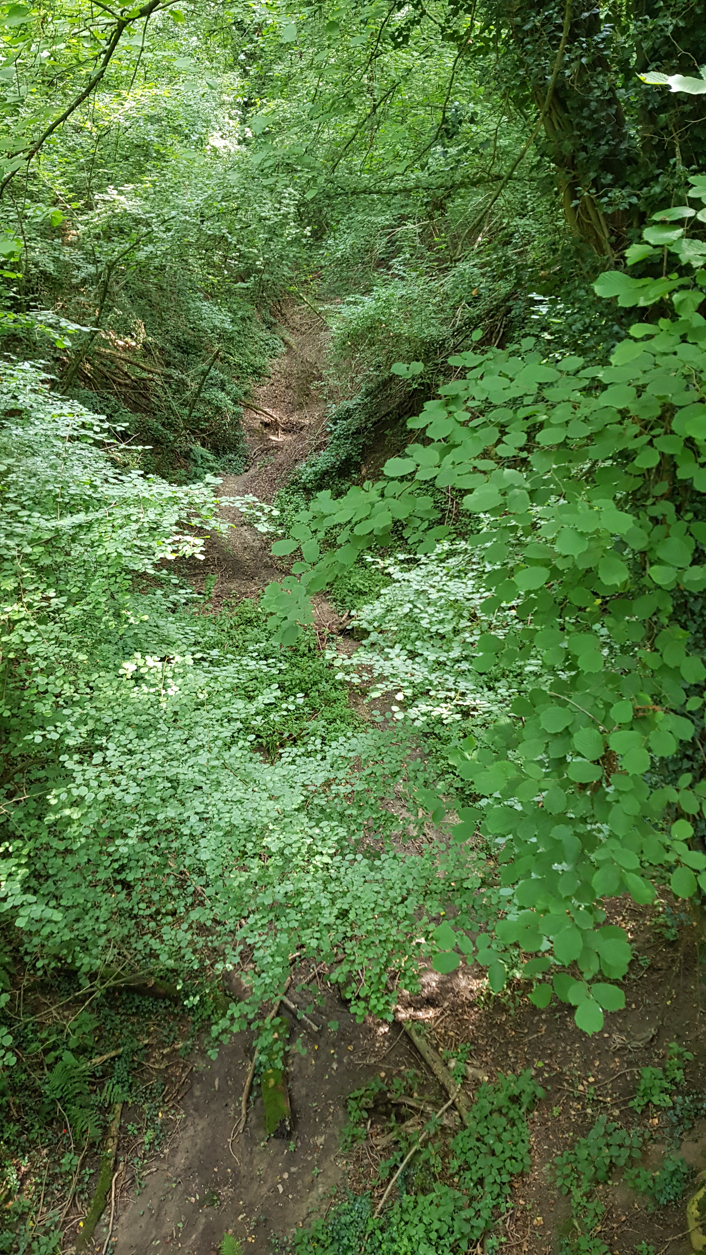 zicht vanaf de Scheggelderbrug over de Scheggelder Grub, Savelsbos, Nederland